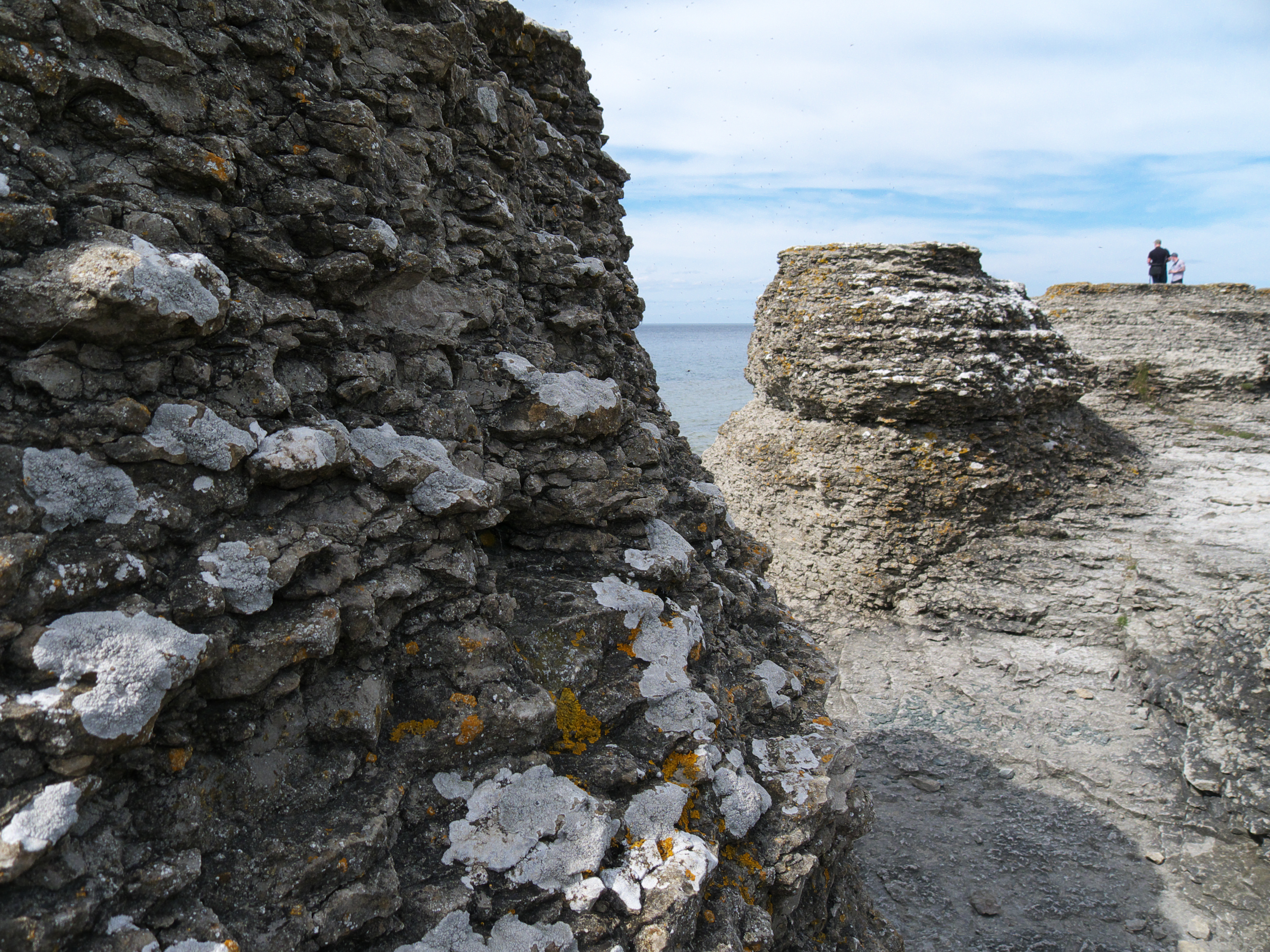 Raukar på Öland